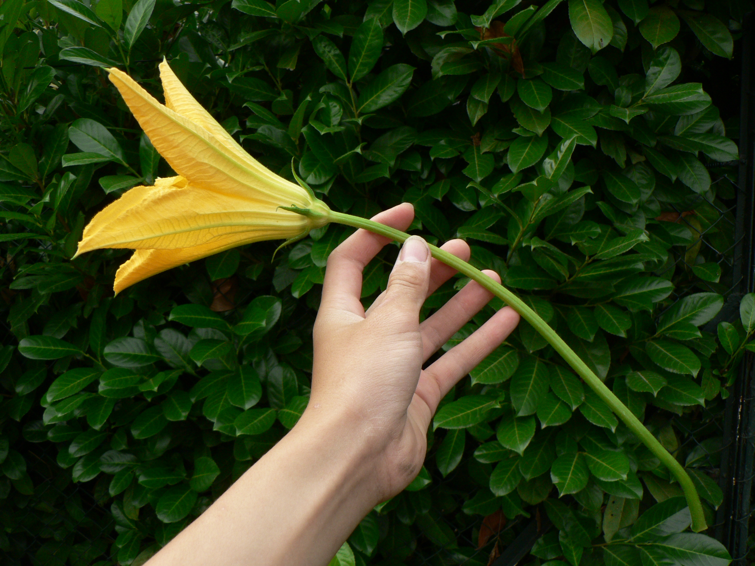 Männliche Zucchiniblüte, hier gut zu sehen: Der lange Stiel, an dem man die männlichen Blüten erkennen kann.